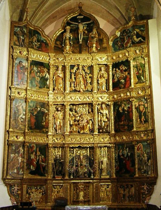 Retablo mayor plateresco del Monasterio Cisterciense de Santa María del Salvador, Cañas, La Rioja, España